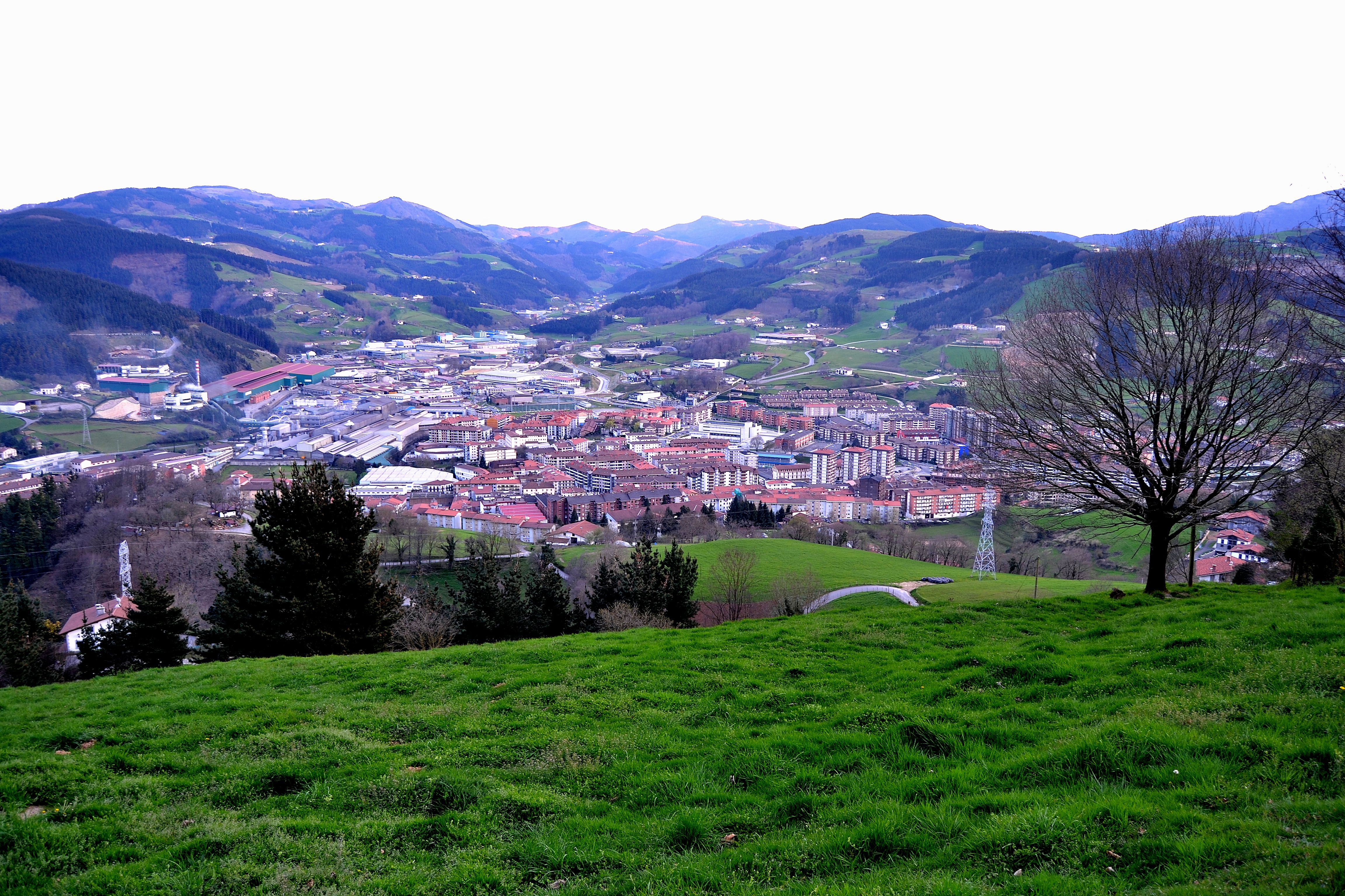 Azpeitia. Gipuzkoa, Euskal Herria. Azpeitia. Gipuzkoa, Basque Country.